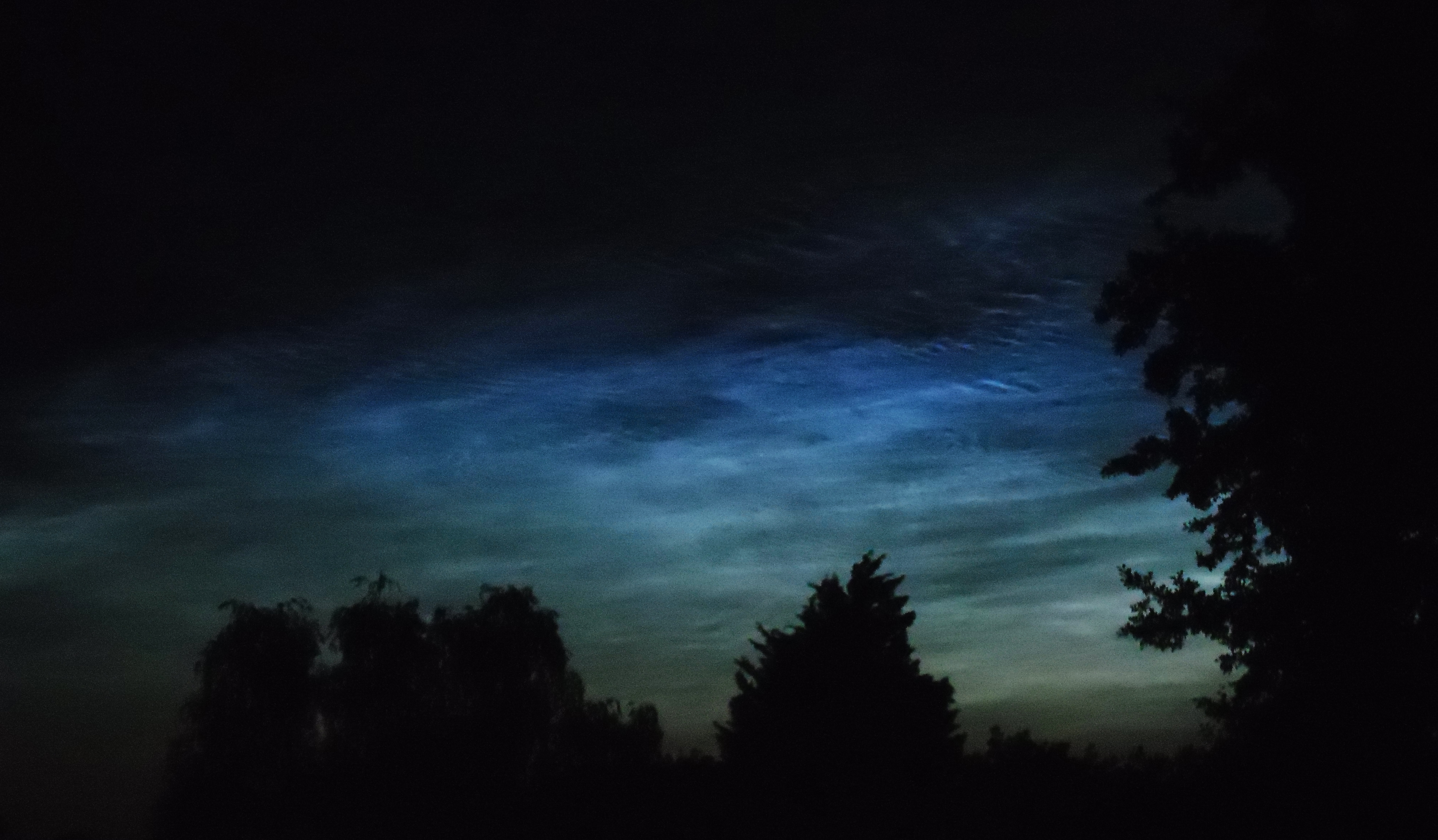 Lichtende nachtwolken, Capelle aan den IJssel, Zuid-Holland op 22 juni 2019 om 00.06 uur.